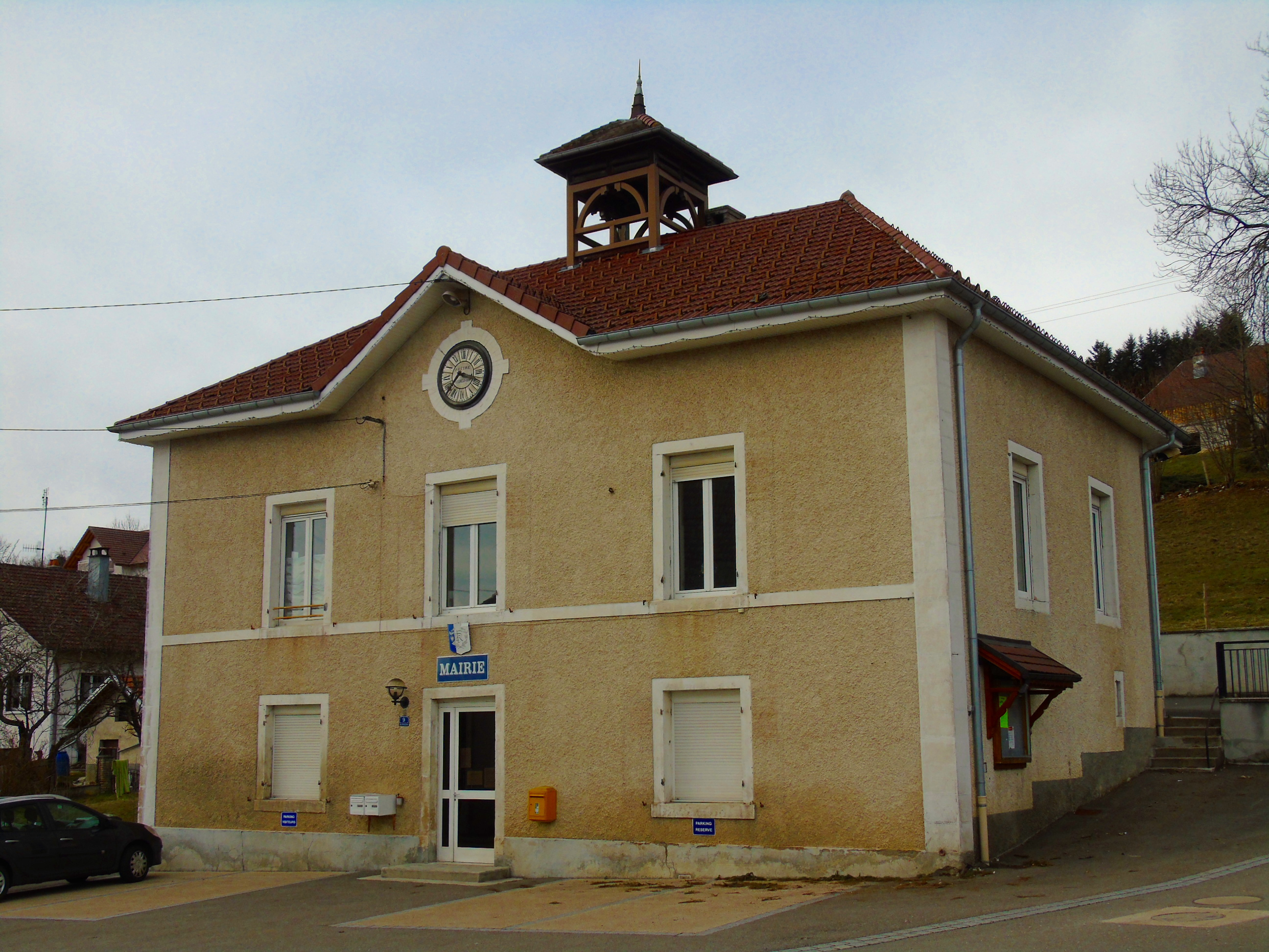 Mairie de Thiébouhans, Doubs, France